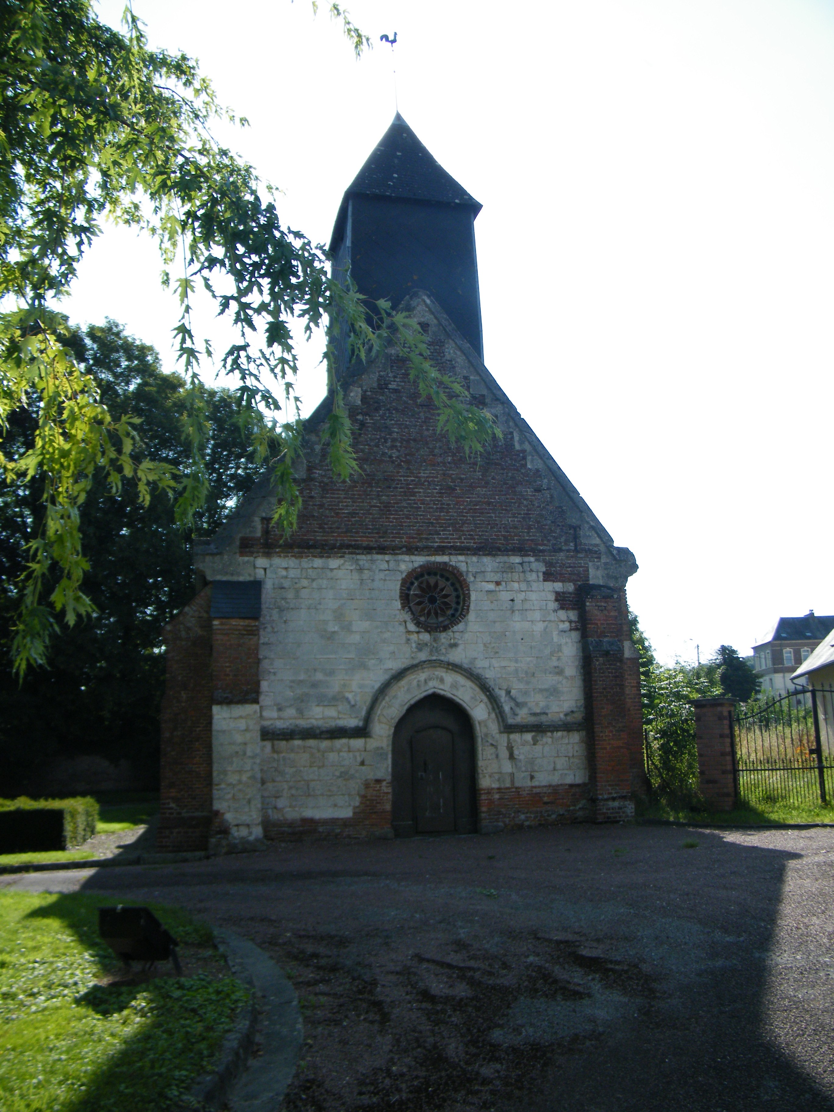 église.